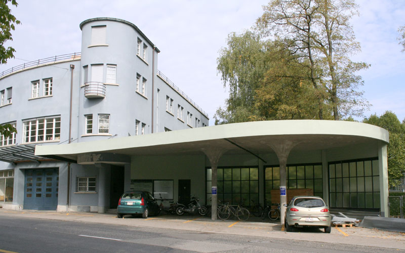 Juragarage Biel-Bienne 1928-1929